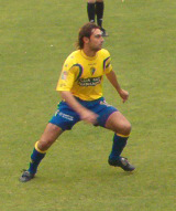 Andrés Fleurquin en un partido en el Ramón de Carranza